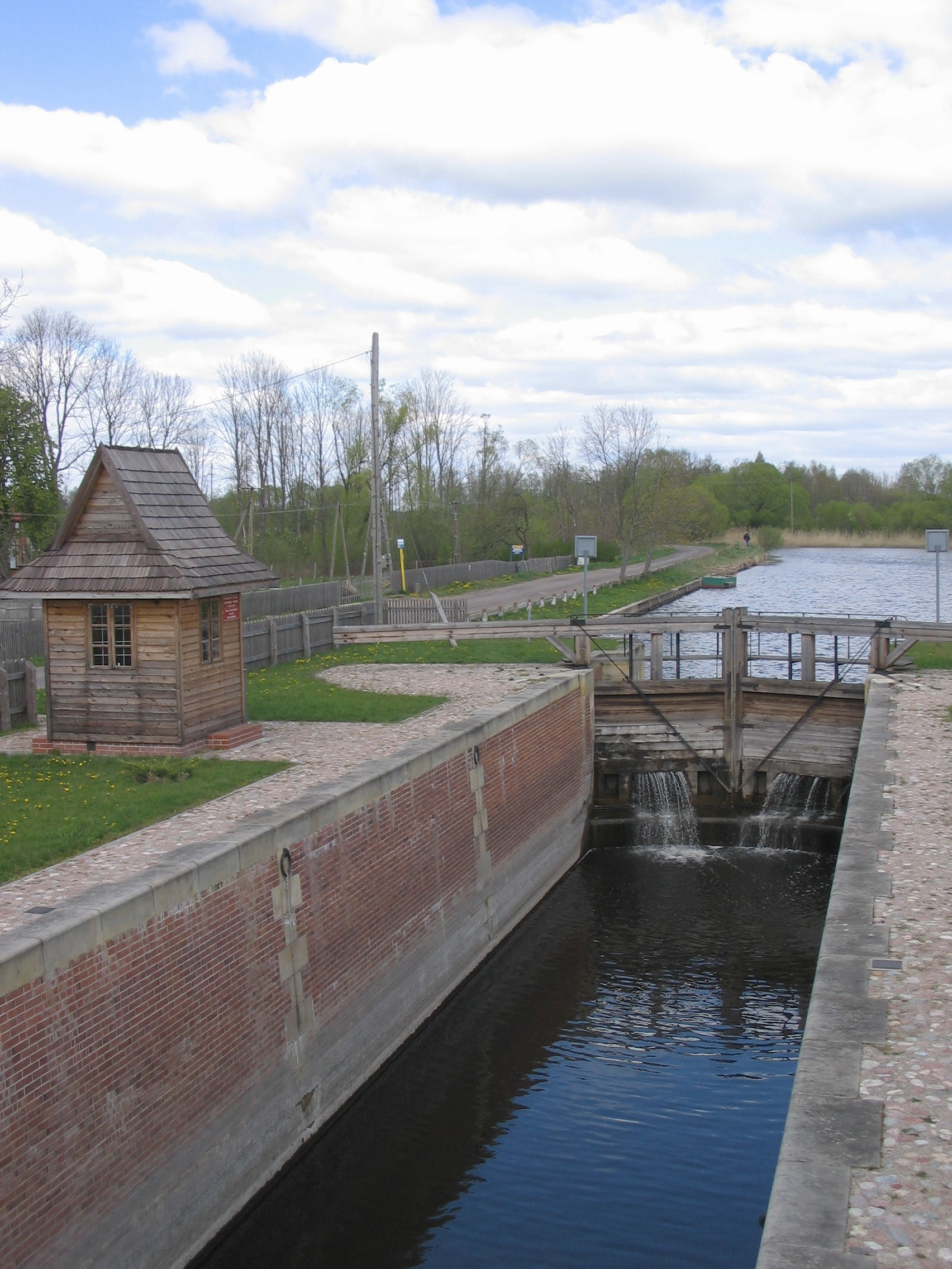 Śluza Dębowo - wrota górne